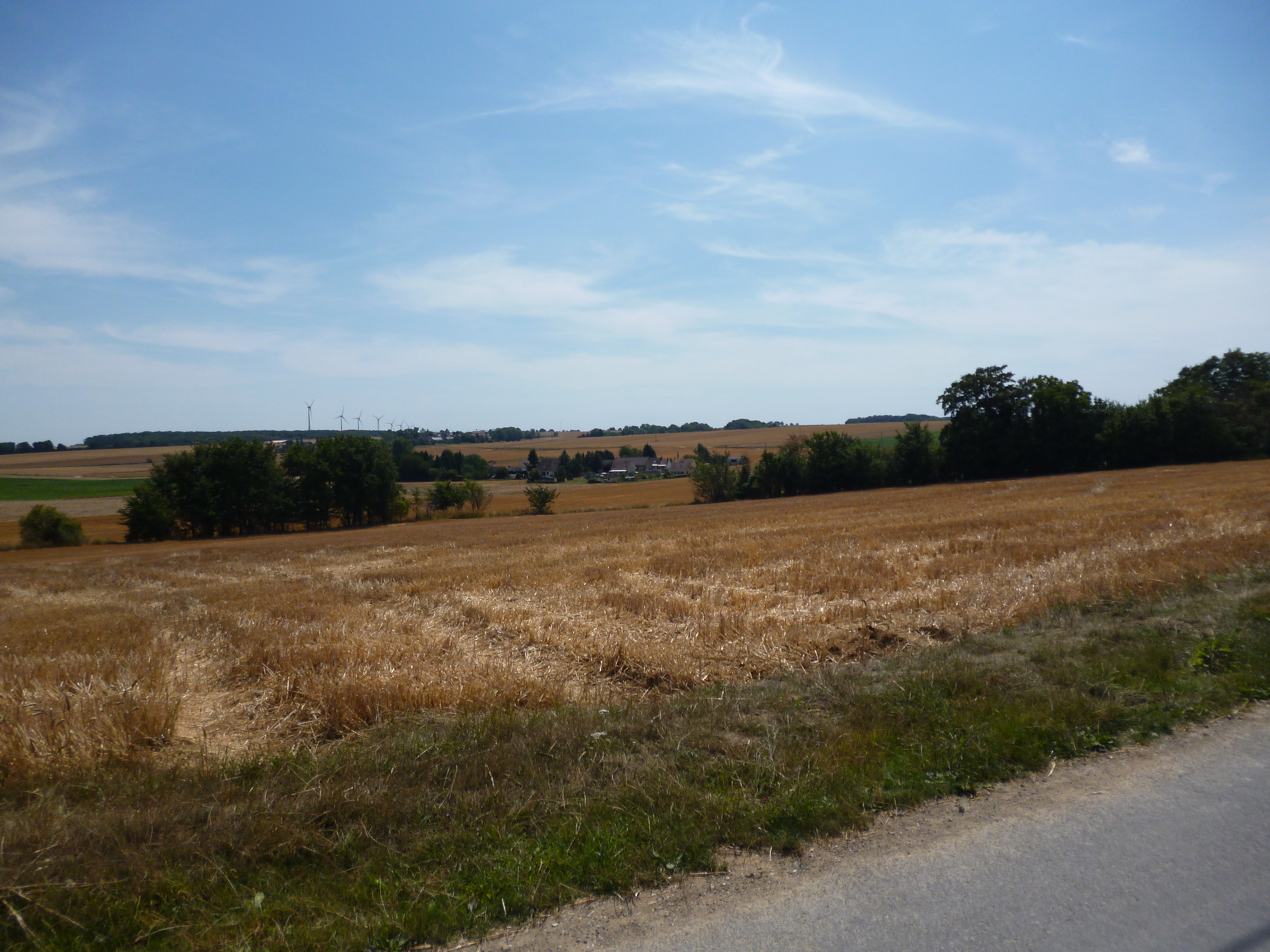 Vue du hameau de Petit-Chepoix, appartenant à la commune de Chepoix (Oise).